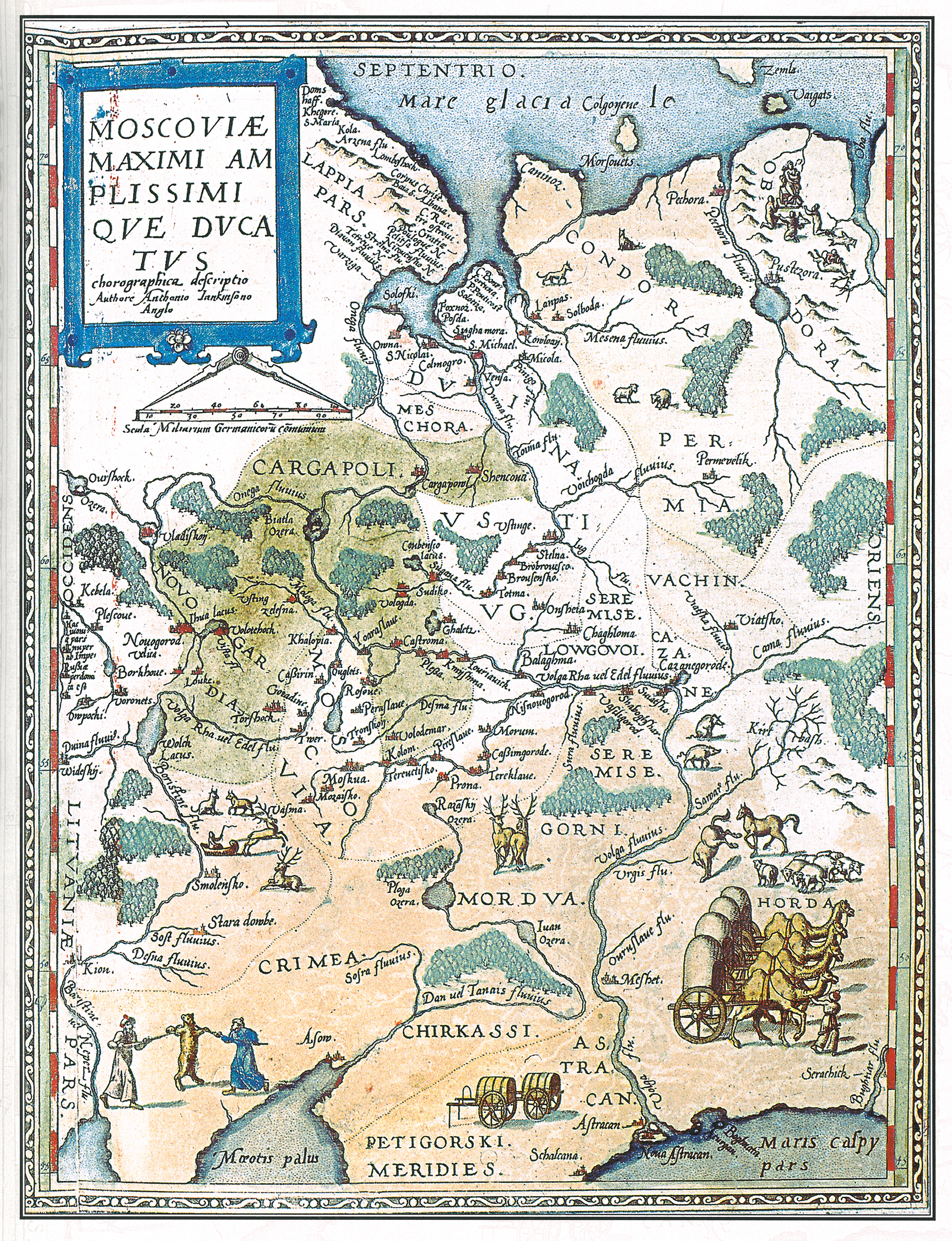 Московия - максимальное (по размеру) великое княжество . Голландская карта 1593 года. Рисунки, в т.ч. Татары ведут медведя"'